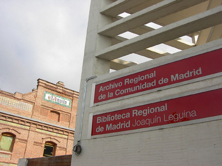 Biblioteca Regional Joaquín Leguina, en Madrid (España)